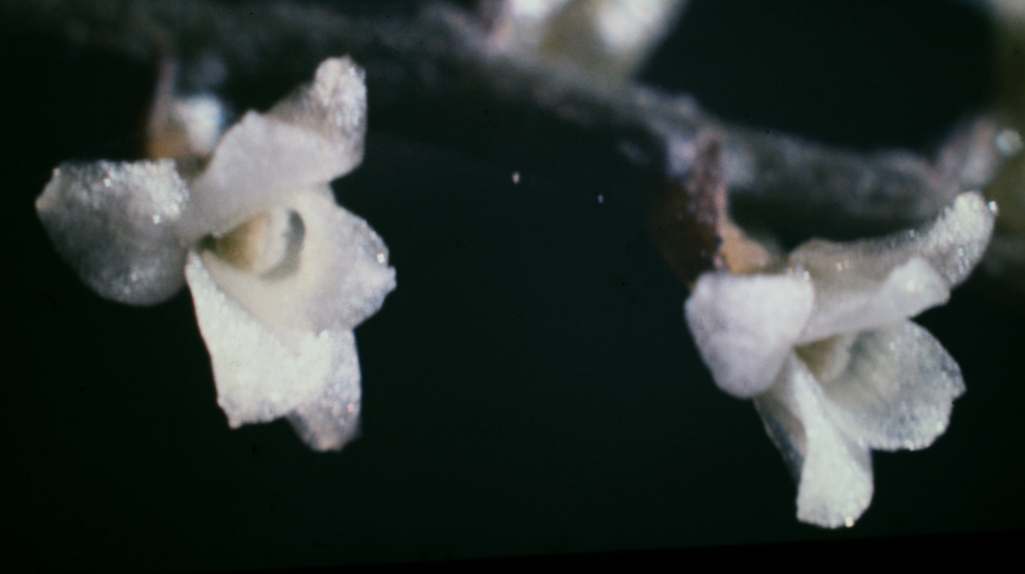 Campylocentrum fasciola, Suriname.